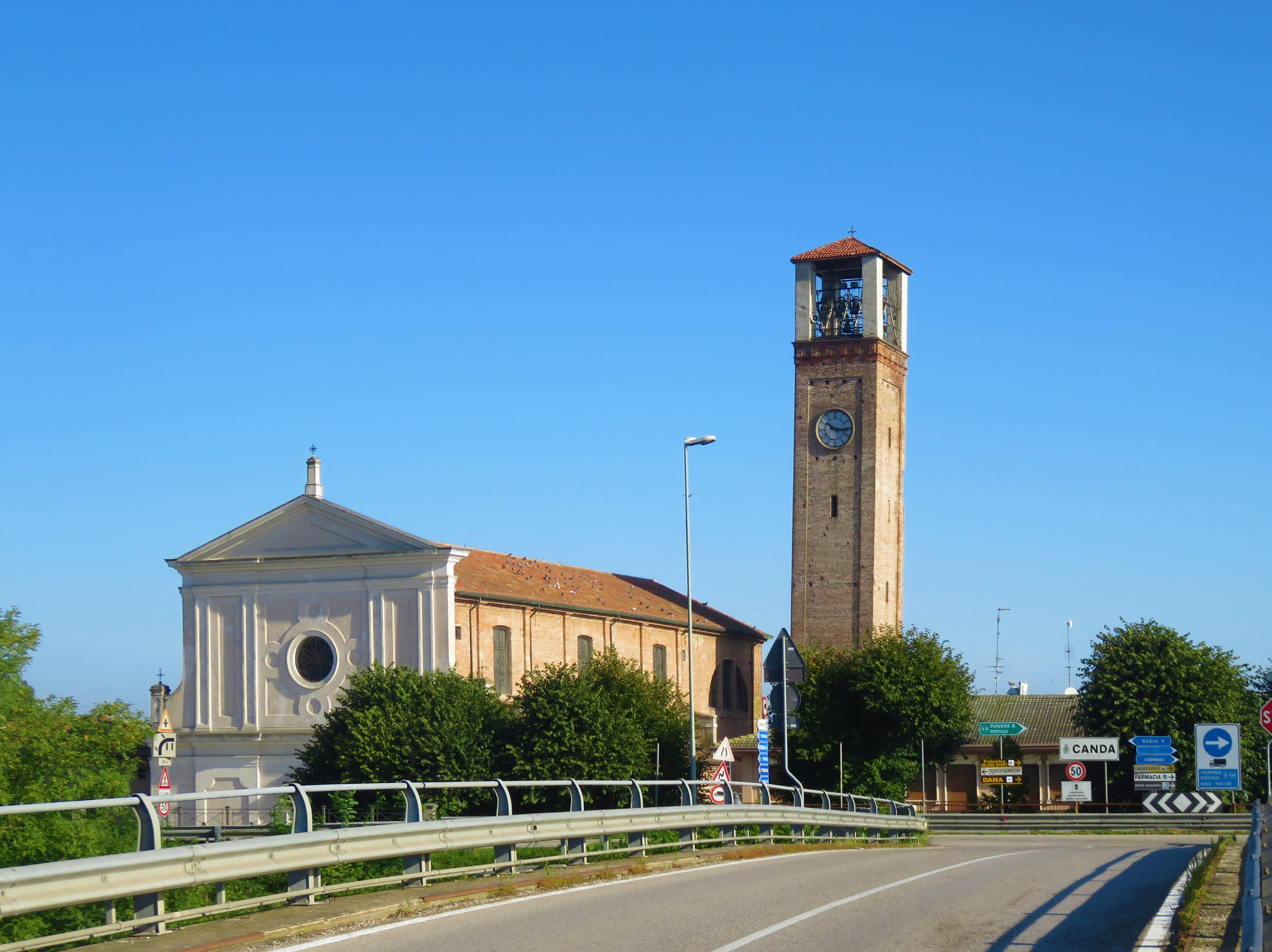 Chiesa di San Michele. Esterno visto da sud.